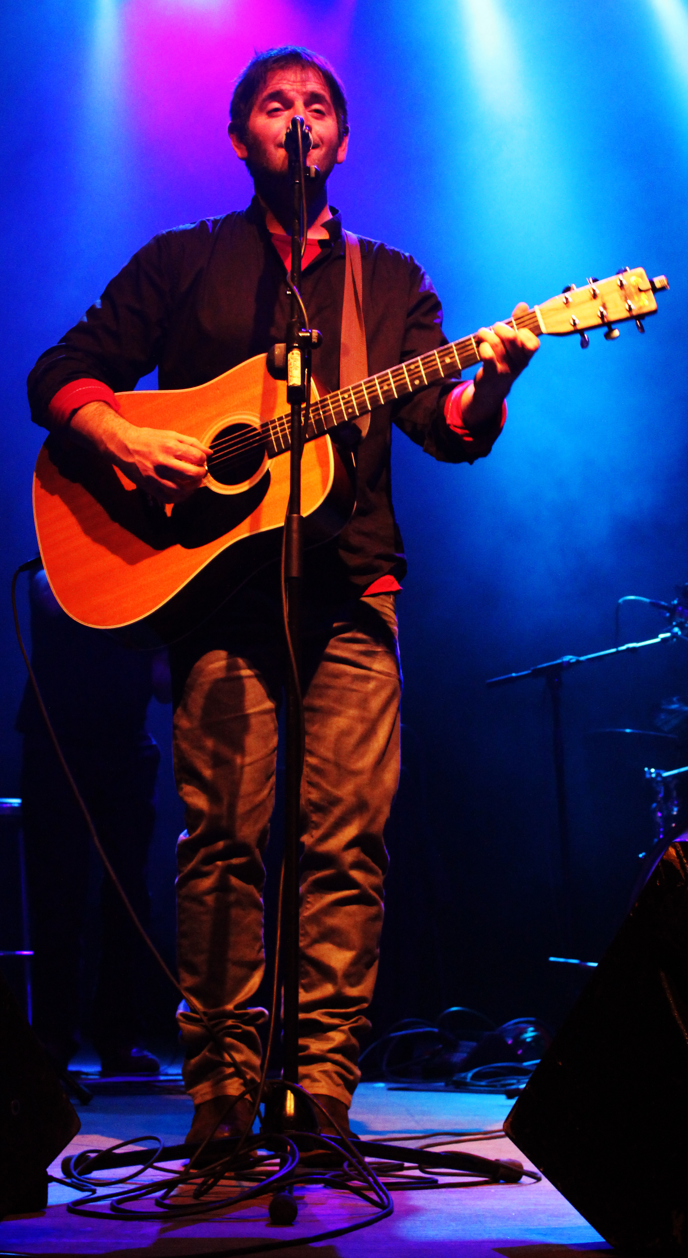 Mikel Urdangarin Bilboko Kafe Antzokian 2013ko abenduaren 28an.